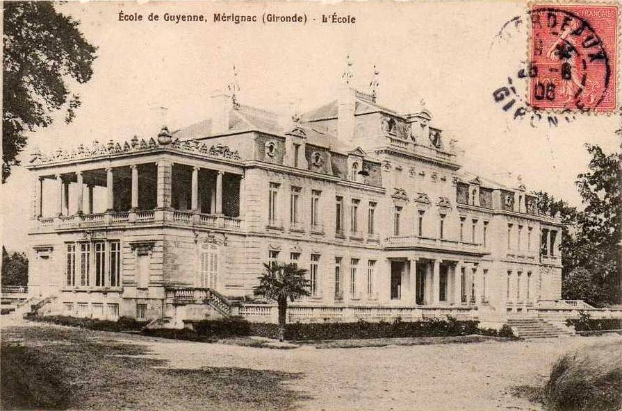 Mérignac on post-cards